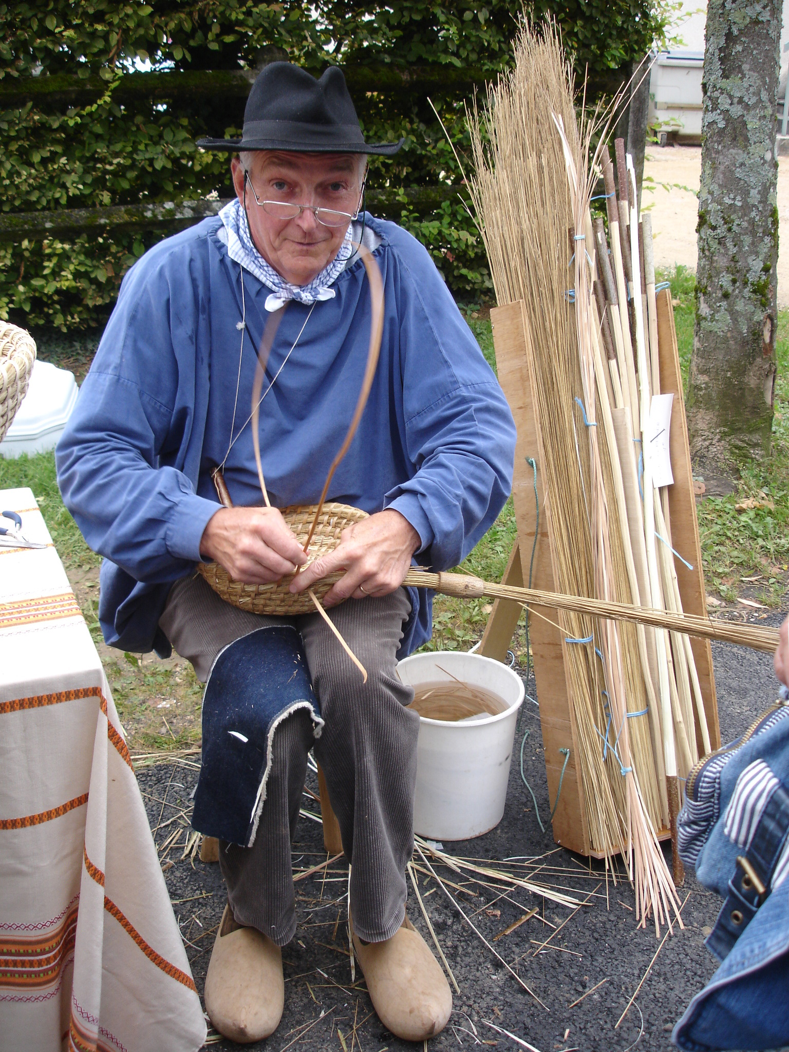 Foire à l'ancienne de Coligny (Ain) : vannier habillé en costume d'époque, faisant une démonstration de vannerie.